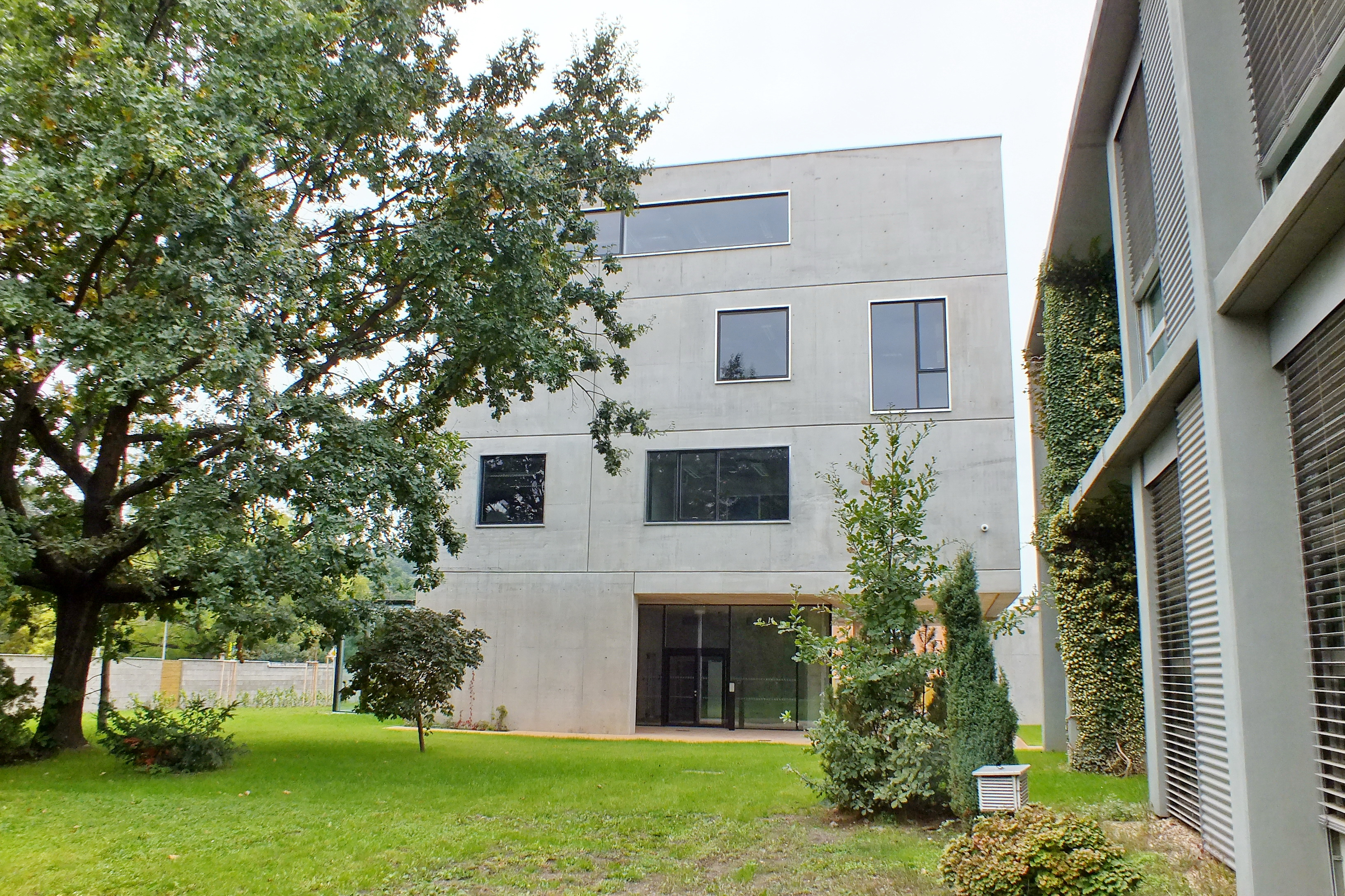 Budova Ústavu výzkumu globální změny (CzechGlobe), Bělidla 986/4a, 603 00 Brno-Staré Brno.